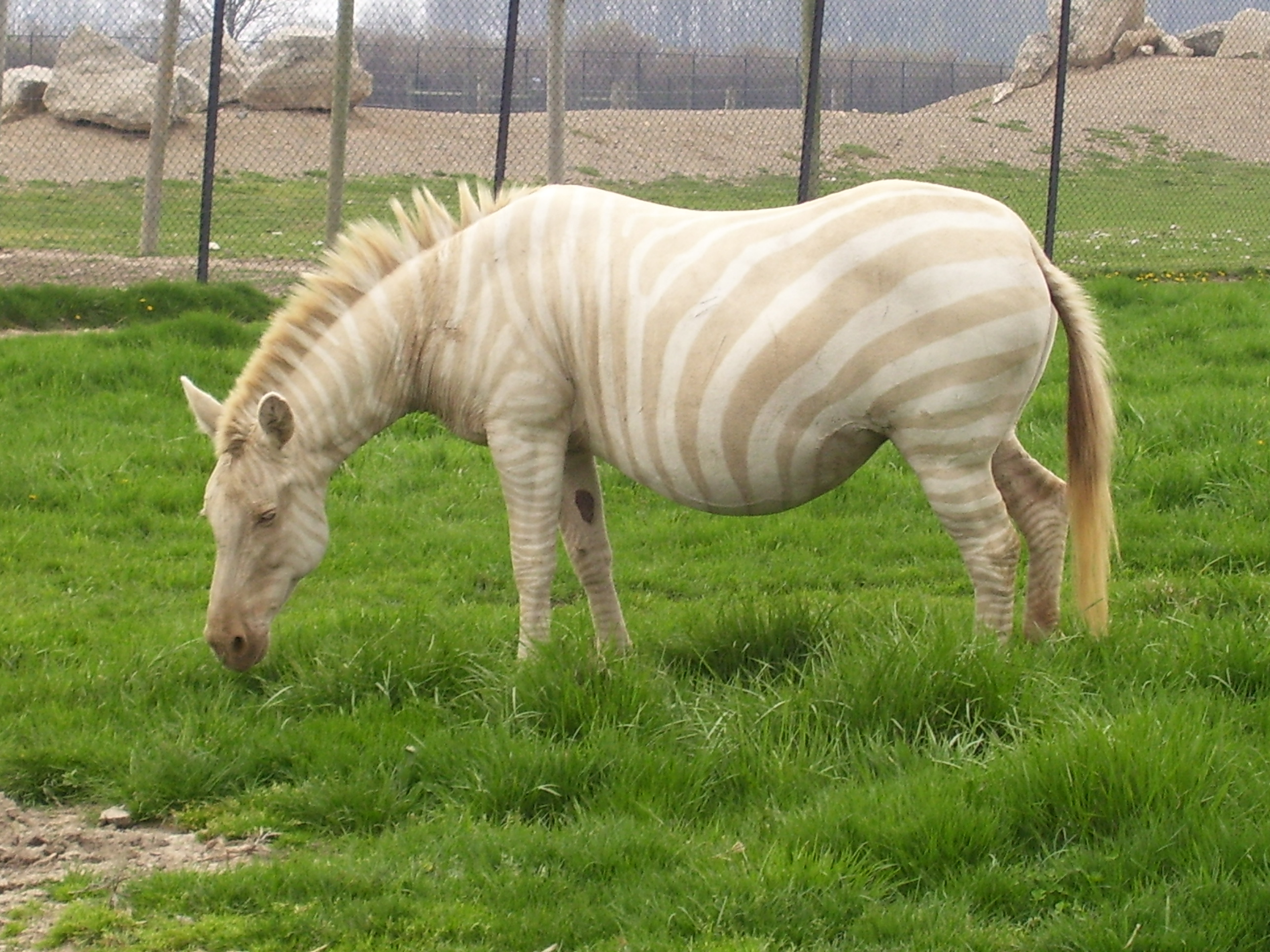 A pregnant, albino zebra viewed at a safari.